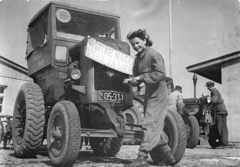 Panschwitz, Auszubildende in der MAS Zentralbild Klein Gr-Ms 20.4.1951 Die neuerrichtete deutsch-sorbische MAS-Station in Panschwitz-Kr.Kamenz. UBz: "Bald werde ich selbst einen Traktor fahren" meint die sorbische Jugenfreundin Christa Mittag, die schon jetzt als Troktoristenlehrling ihren Mann steht.